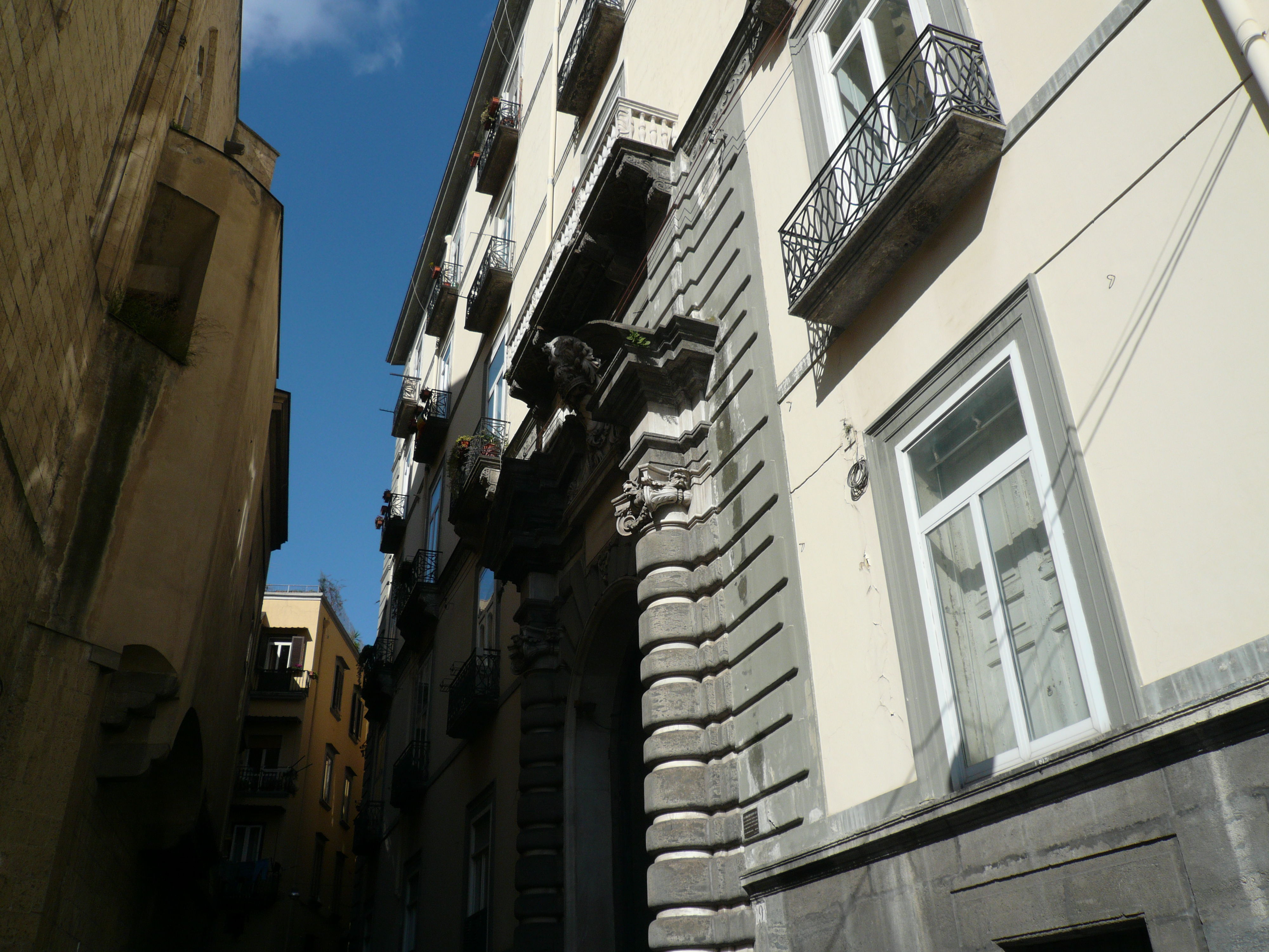 facciata del Palazzo vista da piazza San Domenico Maggiore Autore foto: Roberto De Martino